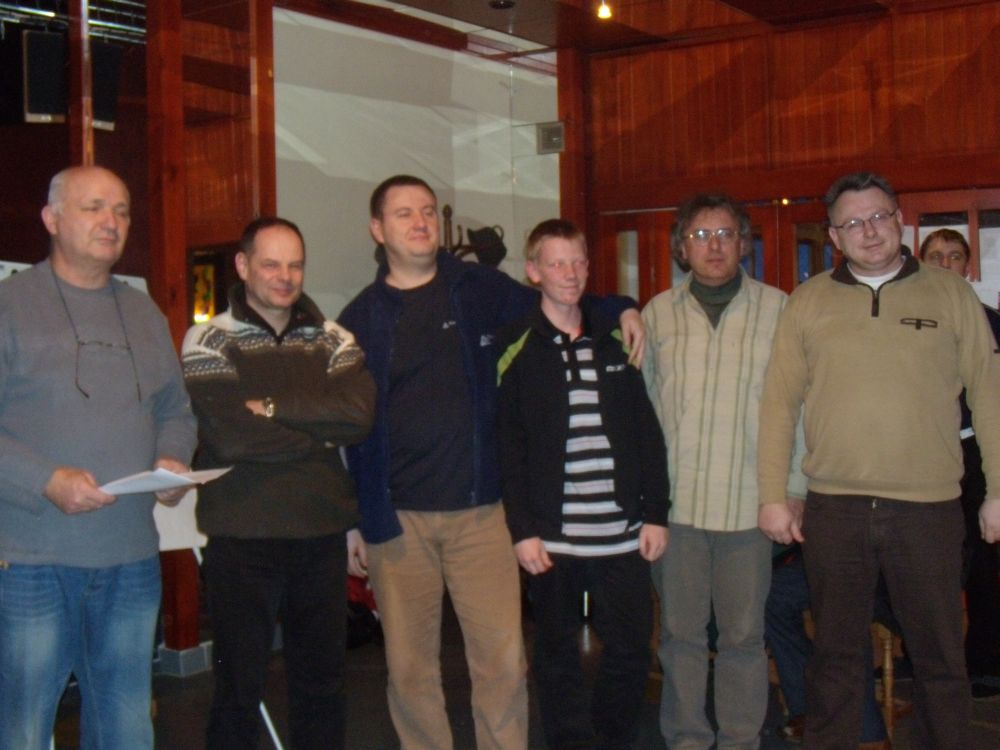 Víťazi Karpatského pohára - družstvá 2009